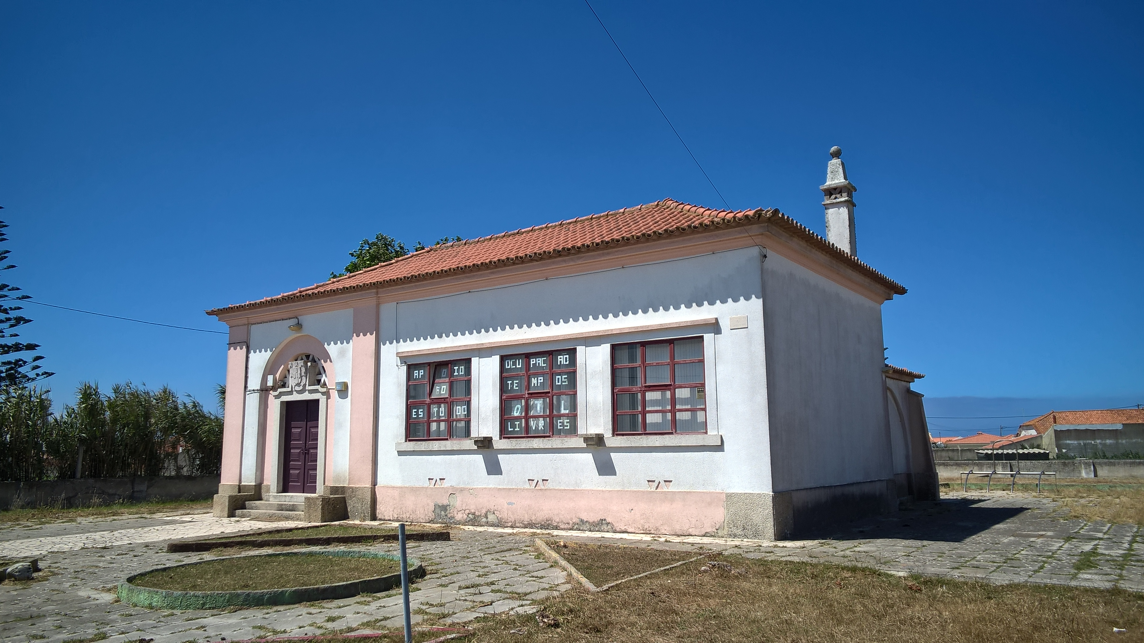 Assafora Escola Primária